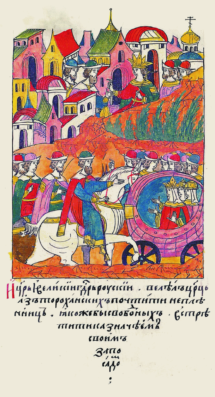 И царь и великий государь Русский велел цариц Астраханских почтить, не как пленниц, а как свободных встретить казначеям своим за посадом. Миниатюра Лицевого летописного свода XVI в.